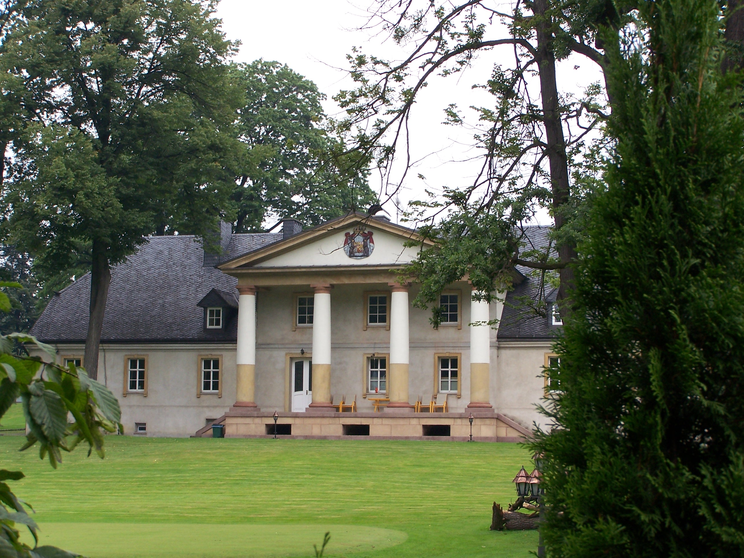 Dwór "Ludwikówka". Autorem zdjęcia jest Lestat.